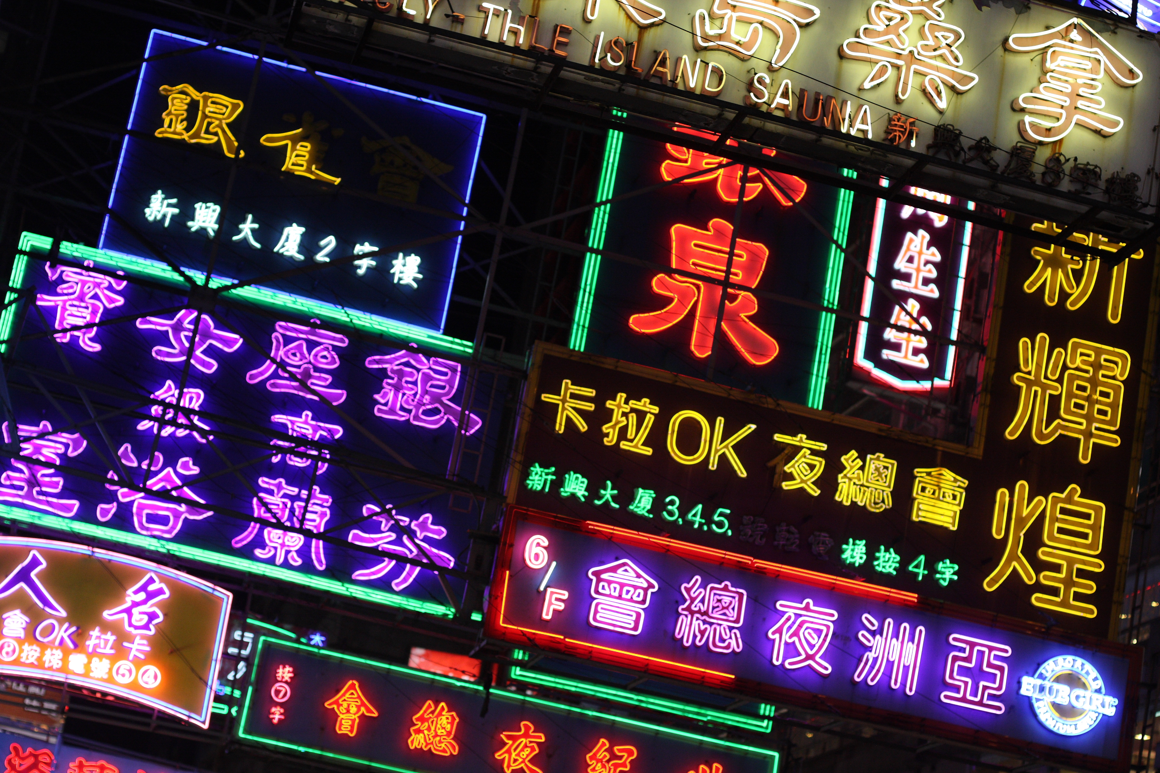 Nathan Road, Hong Kong